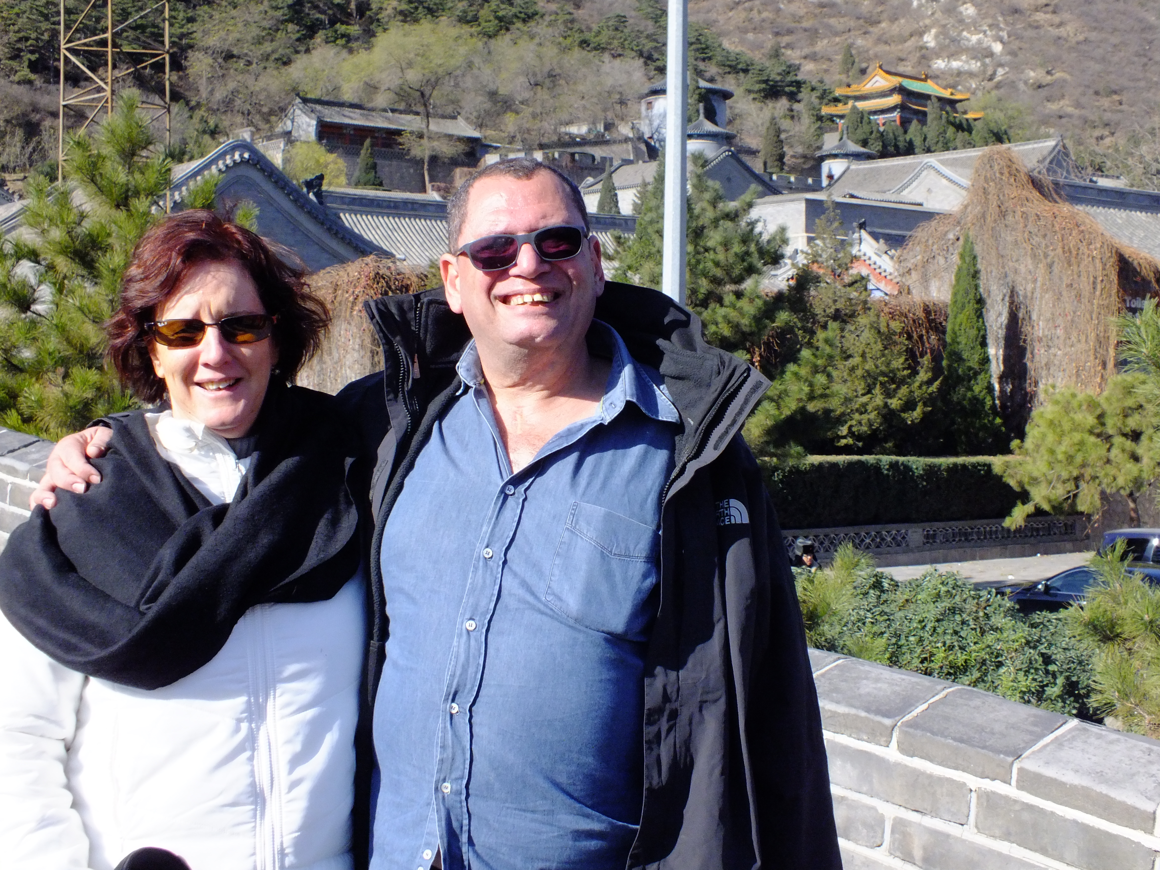 איריס ומעוזיה סגל